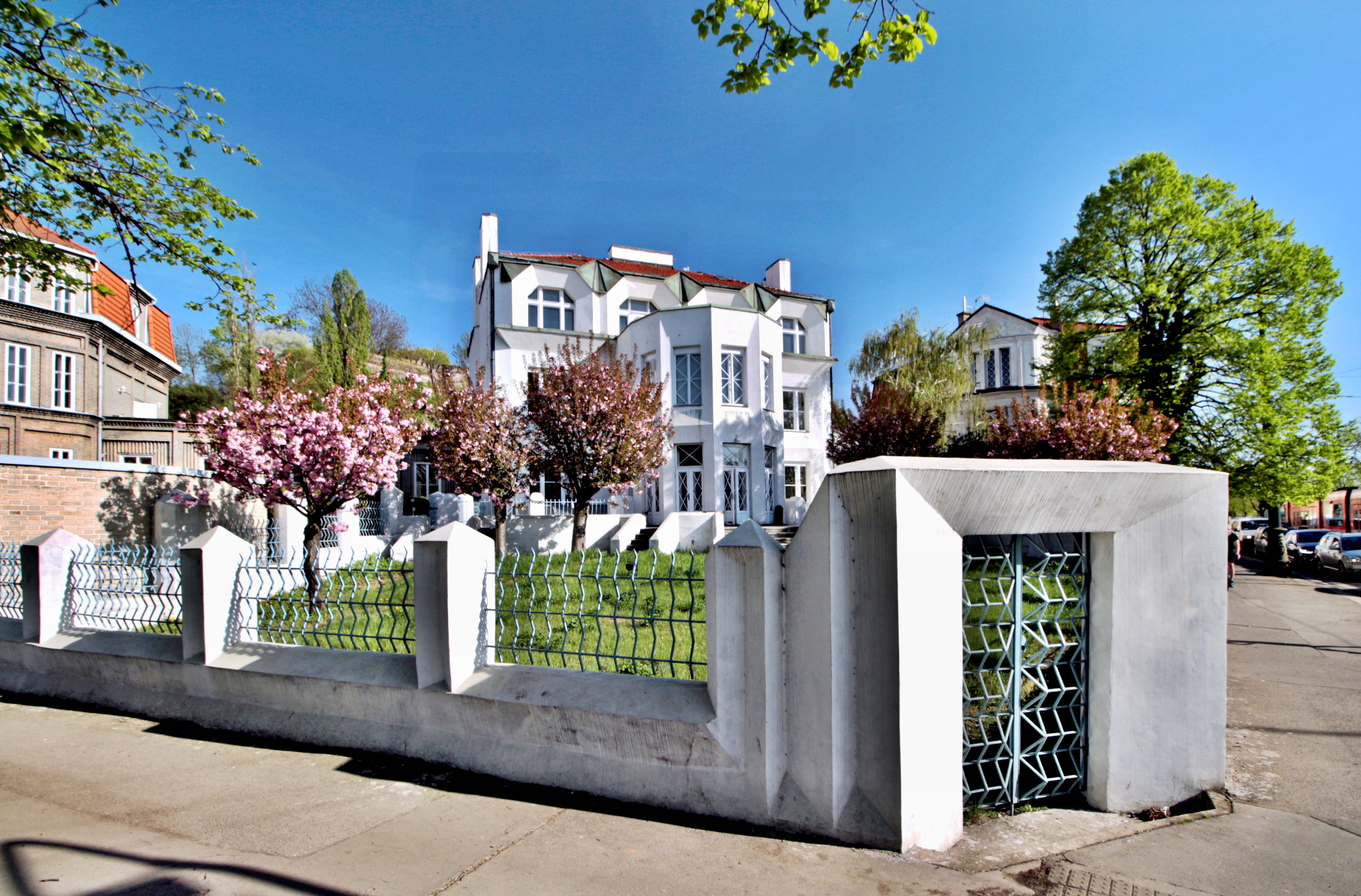 Kovařovicova vila